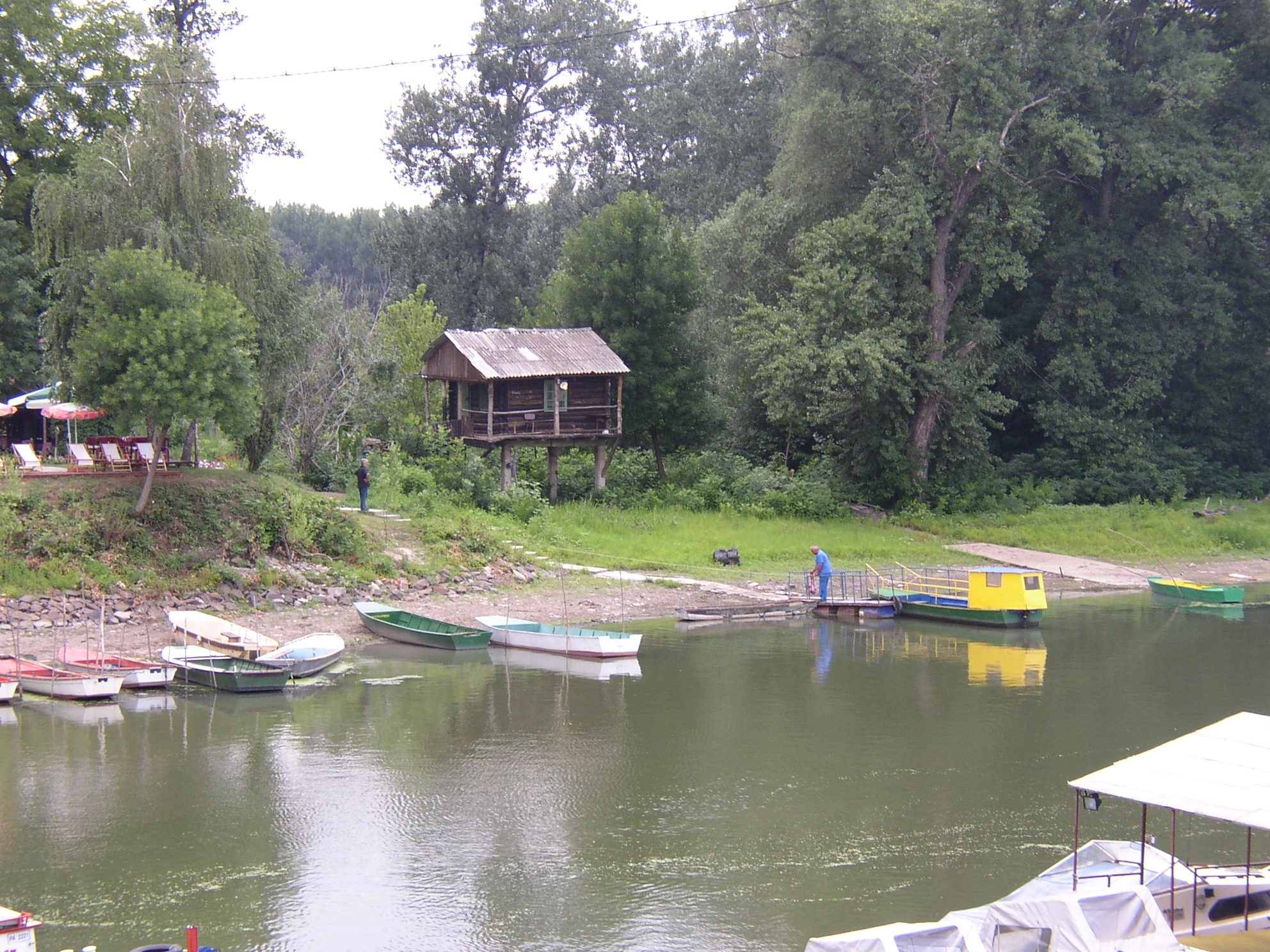 Pancevo Tamis